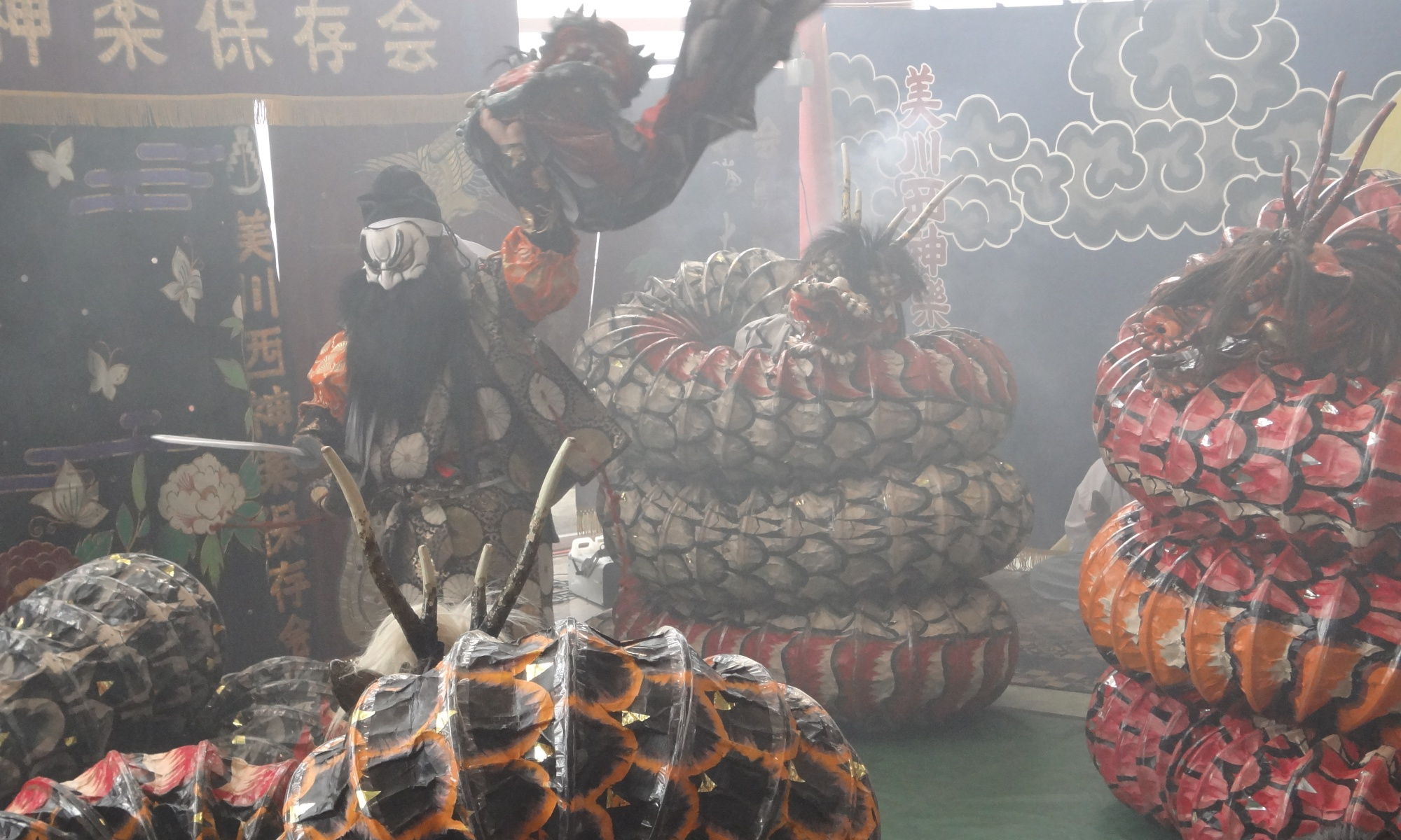 石見神楽/Iwami-Kagura、演目は"大蛇"(おろち)/Program Title:"Orochi"。美川西神楽保存会（島根県浜田市）